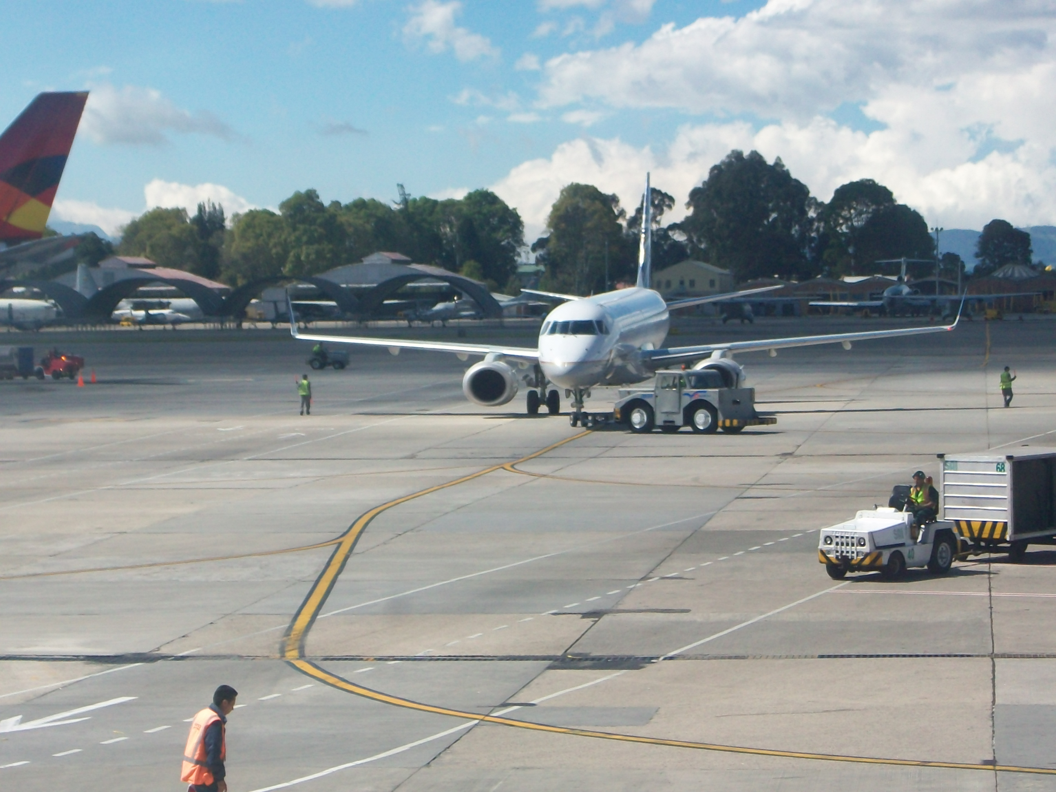 Embraer 190 de Copa Airlines iniciando su carreteo.